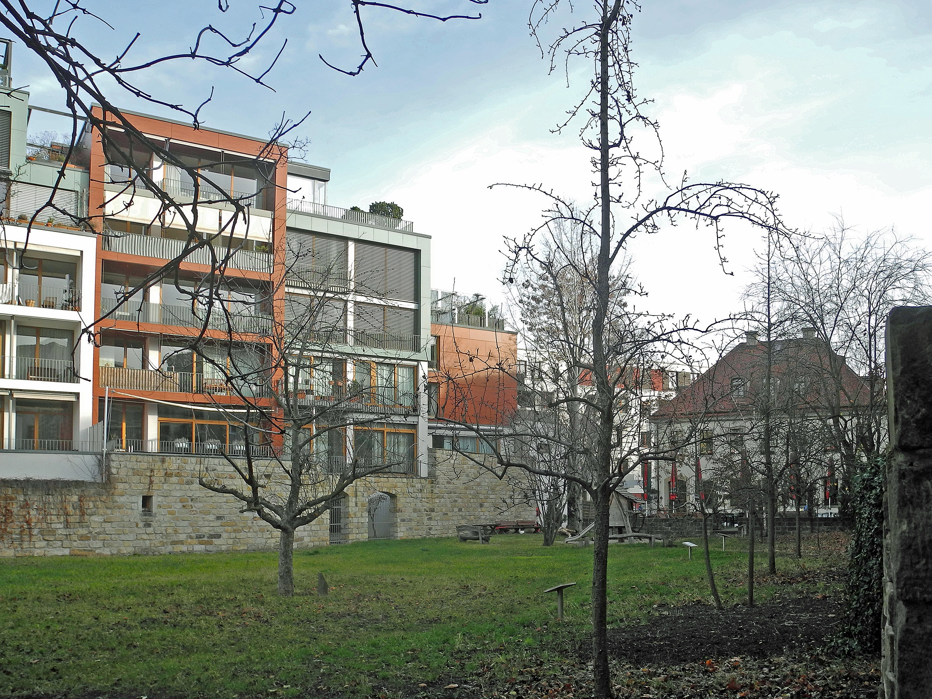 Schießplan hinter dem ehem. Schießhaus in Dresden, Am Schießhaus 19 / Schützengasse